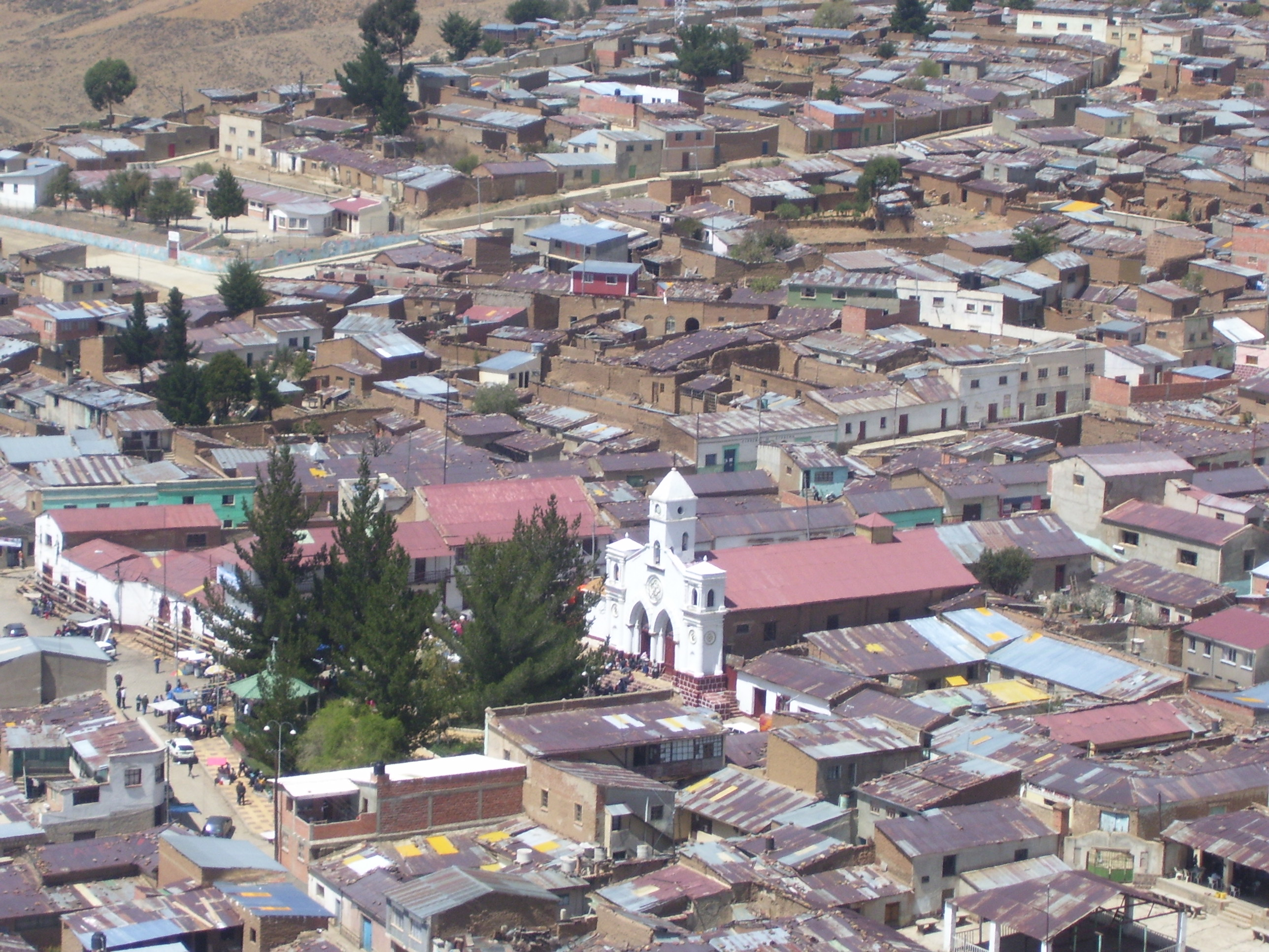 Vista Panorámica de Uncía